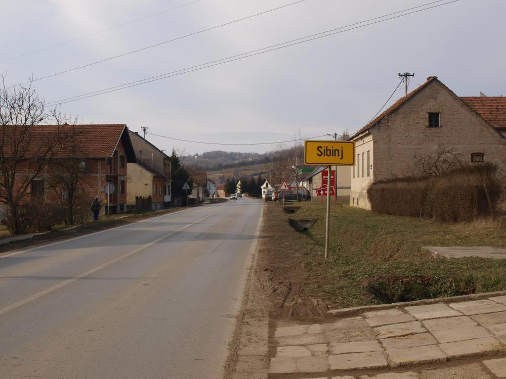 Ulaz u selo Sibinj, Brodsko-posavska županija.